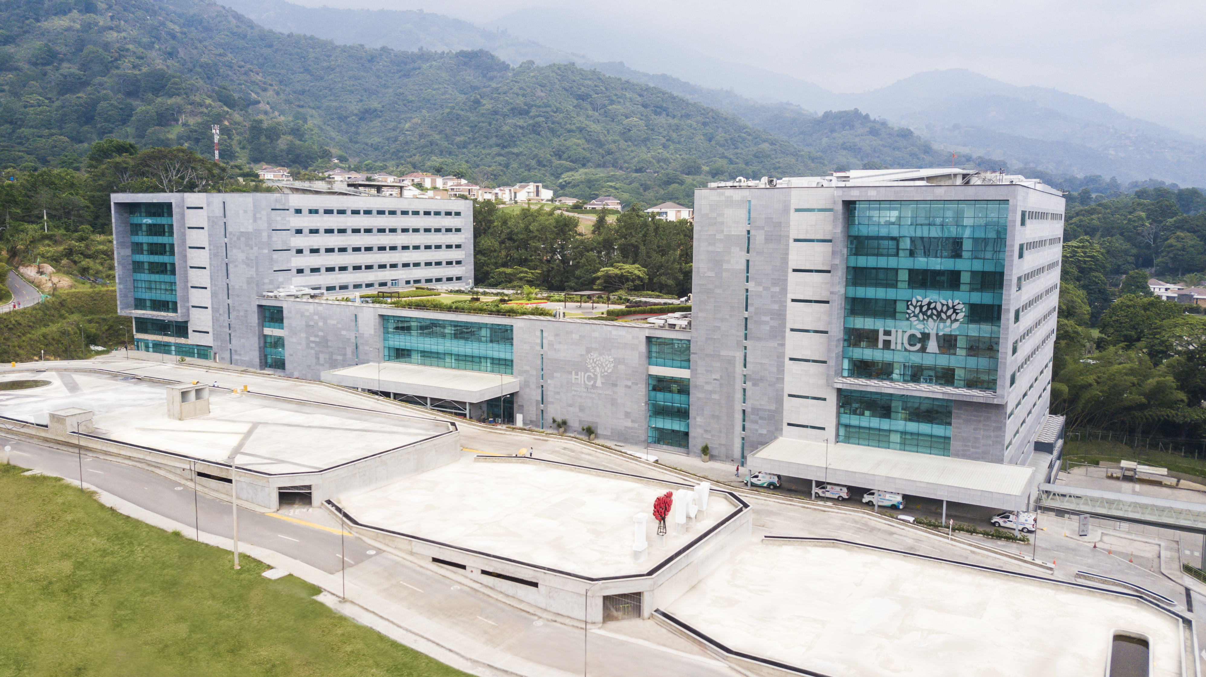 Imagen del Hospital Internacional de Colombia, ubicado en el departamento de Santander.